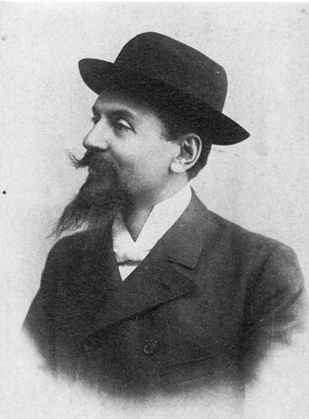 giornalista e politico italiano